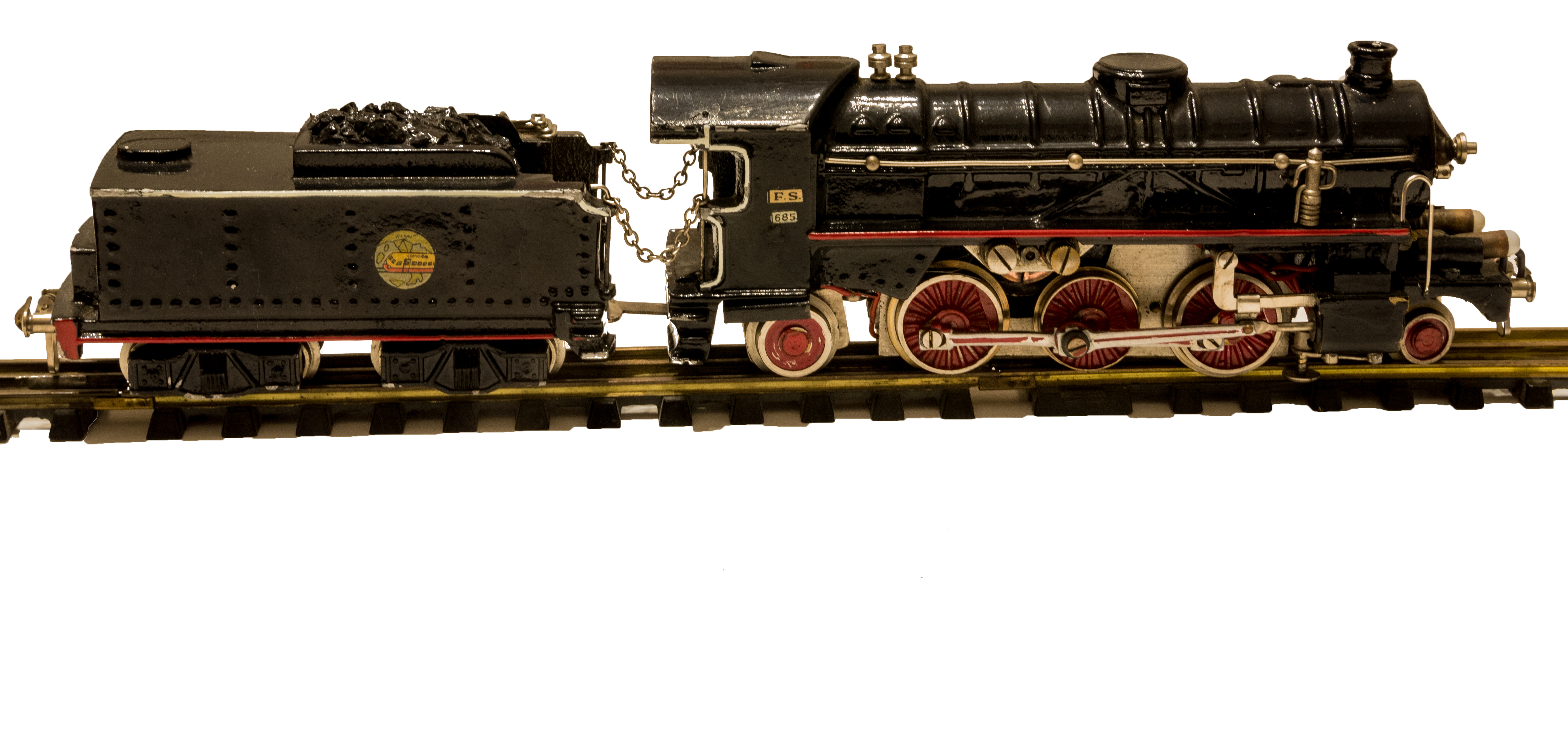 Riproduzione della grande Locomotiva a vapore della FS.